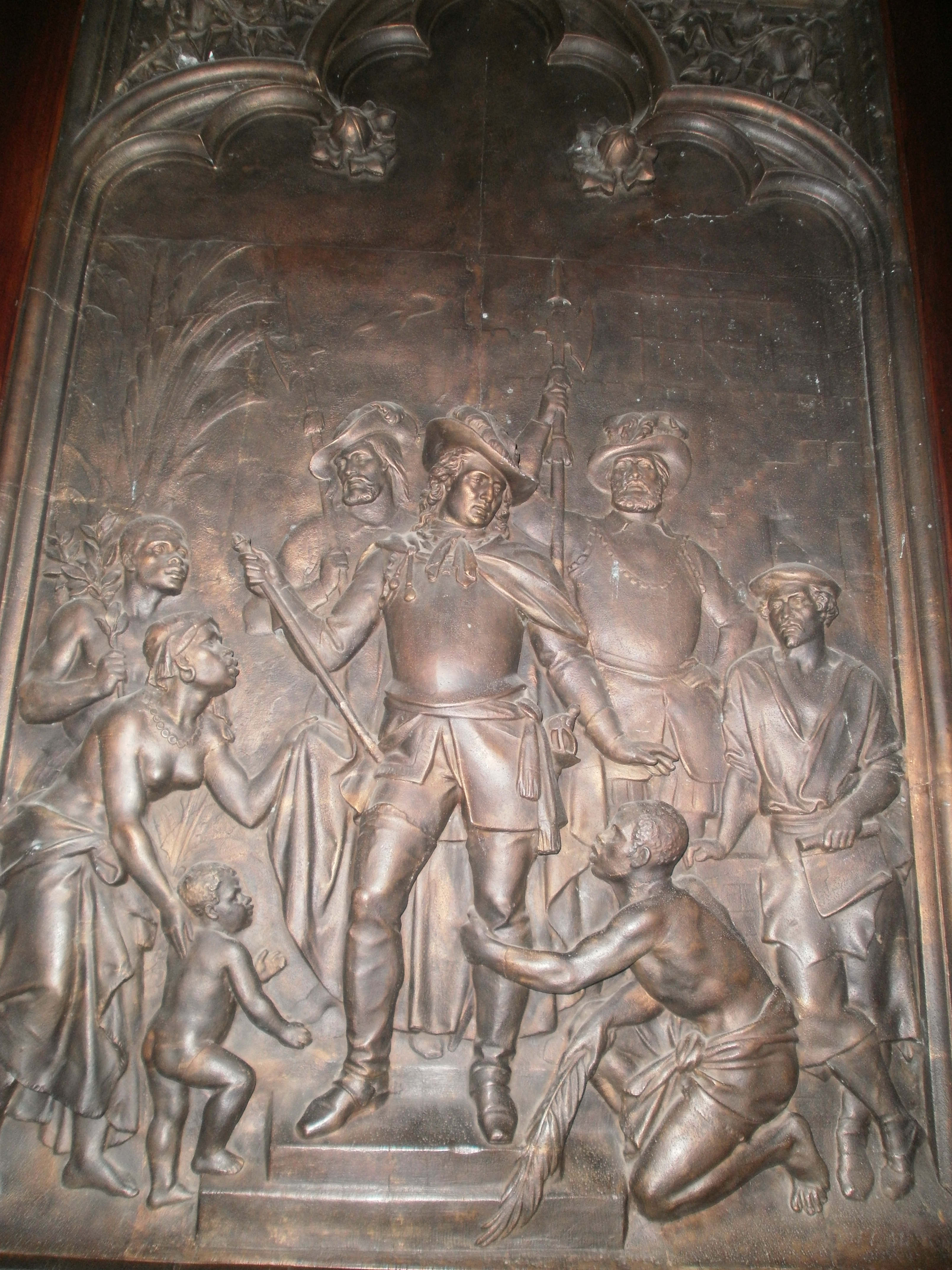 zespół zamkowo-katedralny/ kościół pokatedralny parafialny p.w. Św.Jana Ewangelisty - konkatedra; zamek pokrzyżacki/ w Kwidzynie